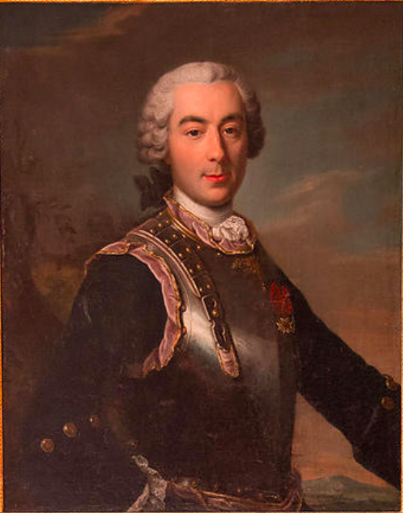 Claude-Marie de Lastic Saint-Jal (1733-1807)